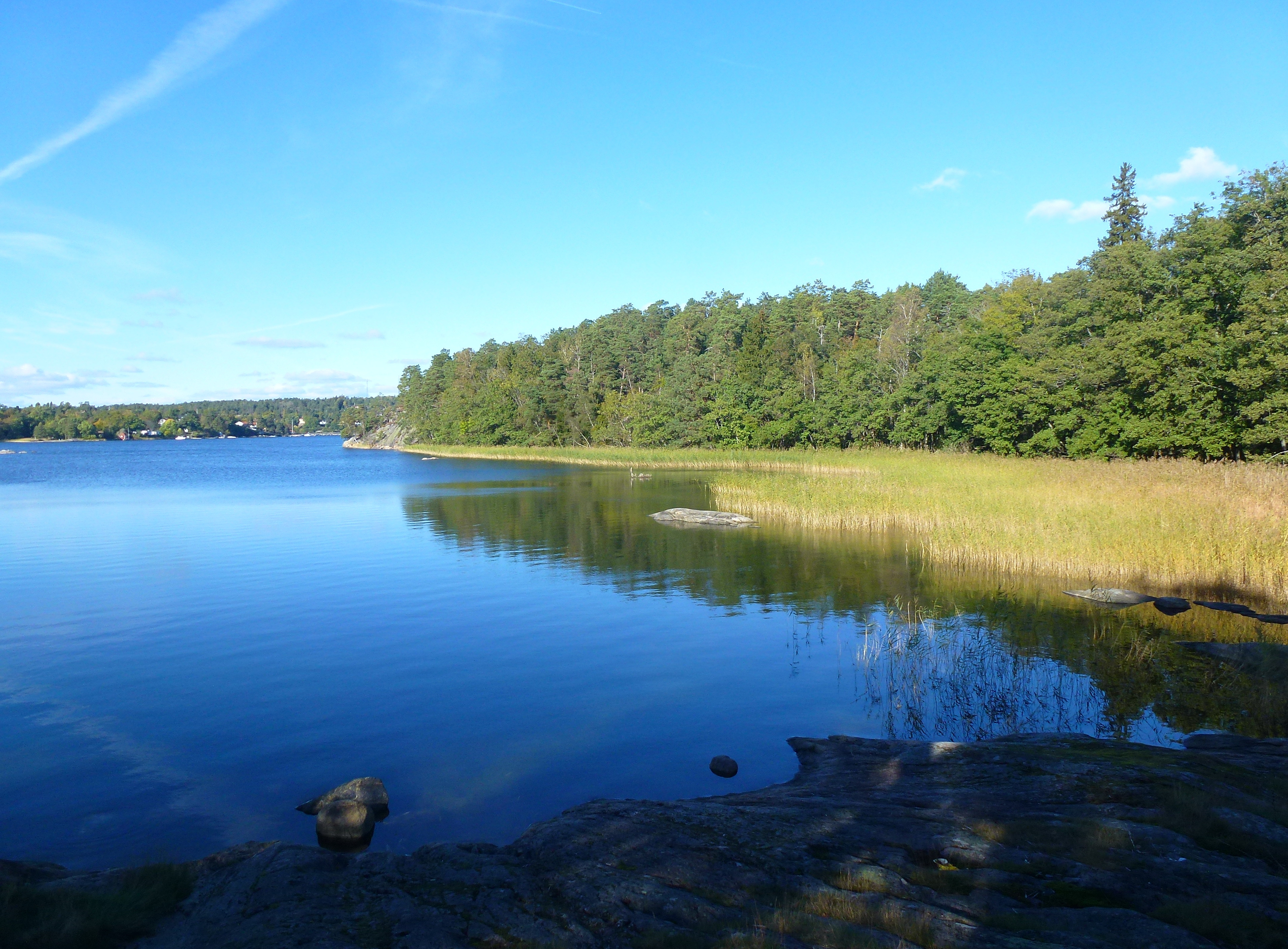 Svärdsö naturreservat, vy över Vårgärdssjön.